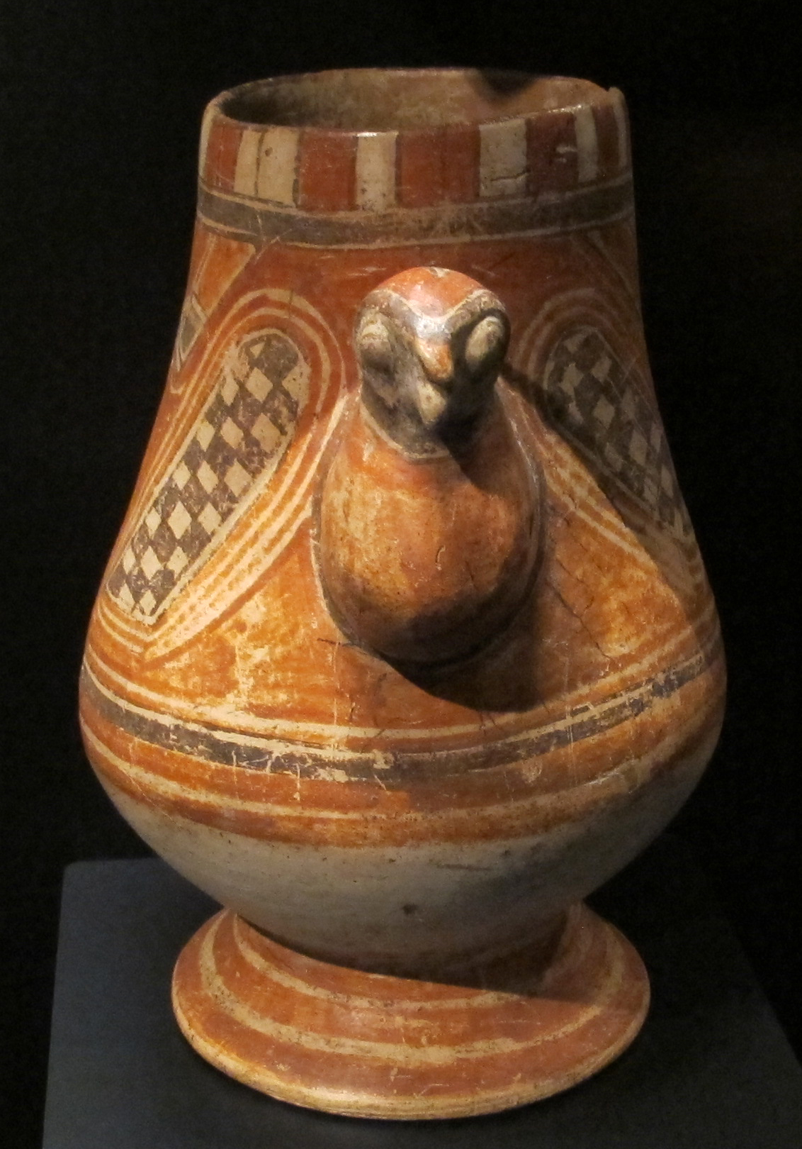 Musée du quai Branly